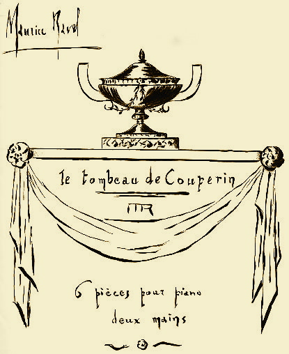 Extrait de la page de couverture du tombeau de Couperin